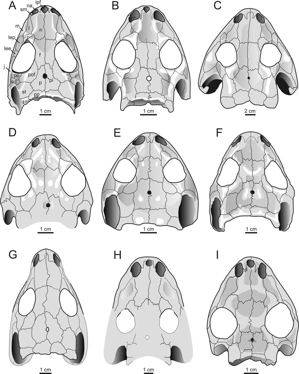 Skull roofs of selected dissorophids in dorsal view. A. Cacops morrisi (OMNH 53073); B. Rio Arriba Taxon (“Broiliellus novomexicanus”, UCMP 40103); C. Dissorophus multicinctus (MCZ 2122, USNM 21904); D. Broiliellus olsoni (FMNH 31189); E. Broiliellus texensis (Williston 1914); F. Broiliellus brevis (MCZ 1424, 1747); G. Platyhystrix rugosus (Berman et al. 1981); H. Aspidosaurus binasser (Berman & Lucas 2003); I. Admiral Taxon (MCZ 2369, “Conjunctio” sp. of Carroll 1964).